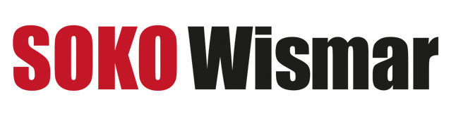 Logo der Serie Soko Wismar